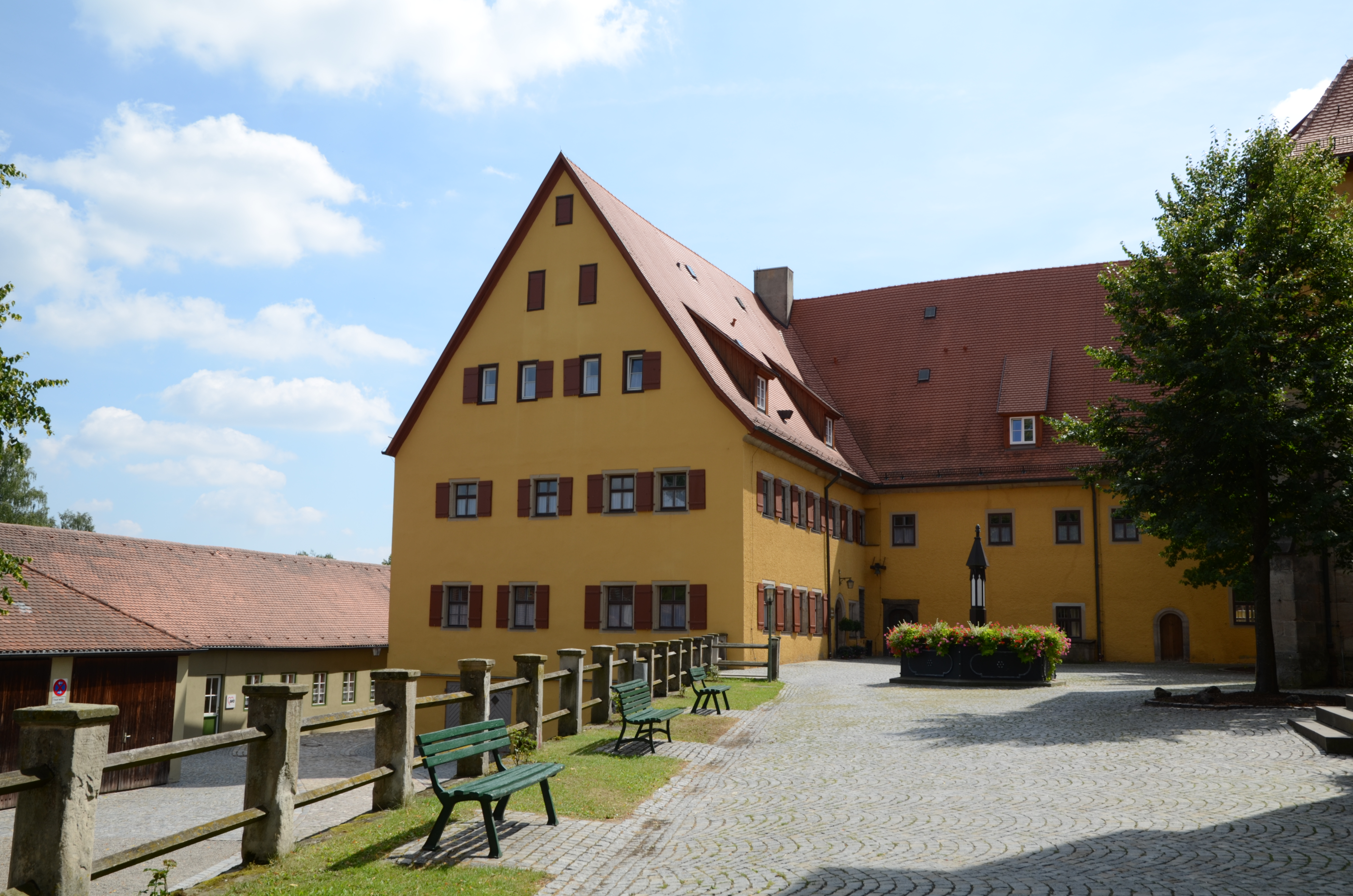 Dr.-Martin-Luther-Straße 6 a, ehem. Pfründehaus des Spitals